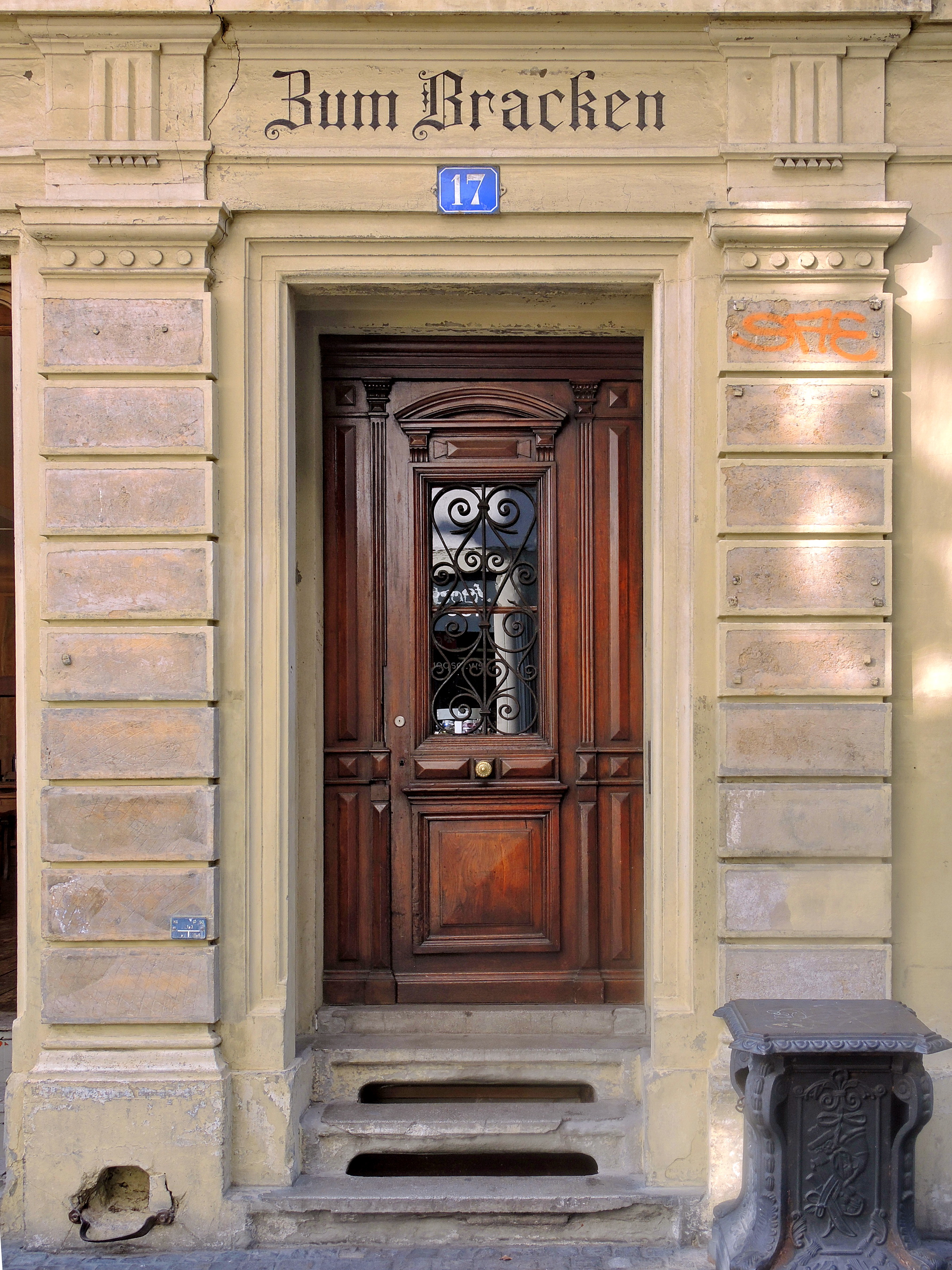 Katharina von Zimmern (1478-1547) : Haus «zum Bracken», Oberdorfstrasse 17 in Zürich (Switzerland)